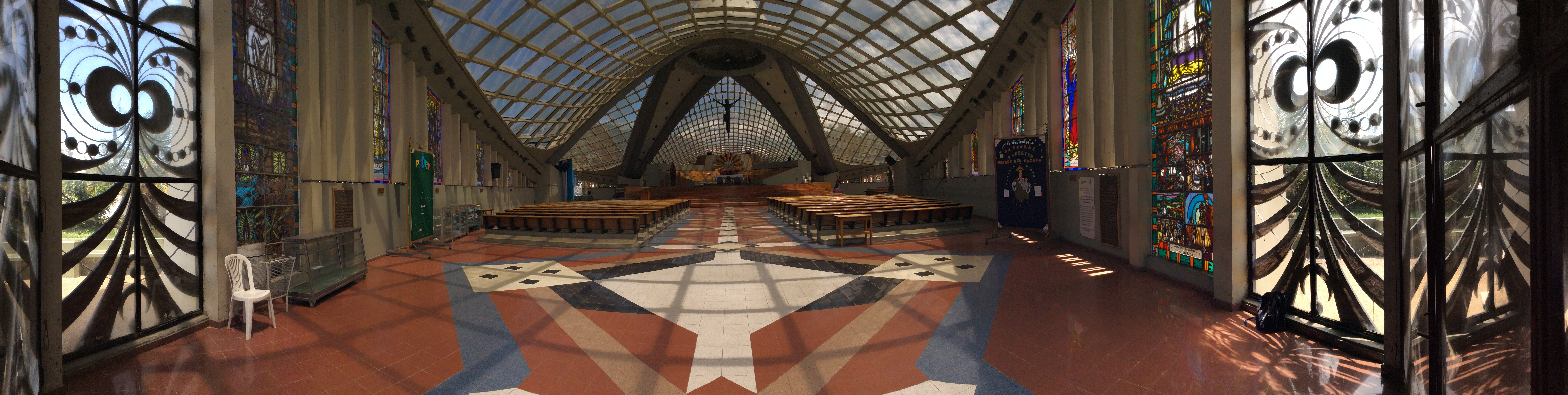 Interior de la nave principal de la Catedral Metropolitana, al fondo se aprecia el altar con un Cristo de madera suspendido en el aire, hermoso diseño, con acabados de cerámica en el suelo que marcan un eje que conduce al altar. La iglesia es adornada con vitrales coloridos en sus cerramientos. Su techo de vidrio da grandiosa iluminación al lugar y da la sensación de unión con el cielo.